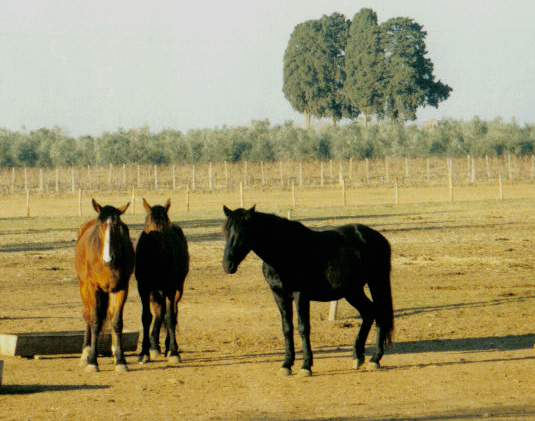 descrizione: Cavalli maremmani allo stato brado lavoro personale di Vinattieri Matteo (25/01/2007) che lascia in pubblico dominio